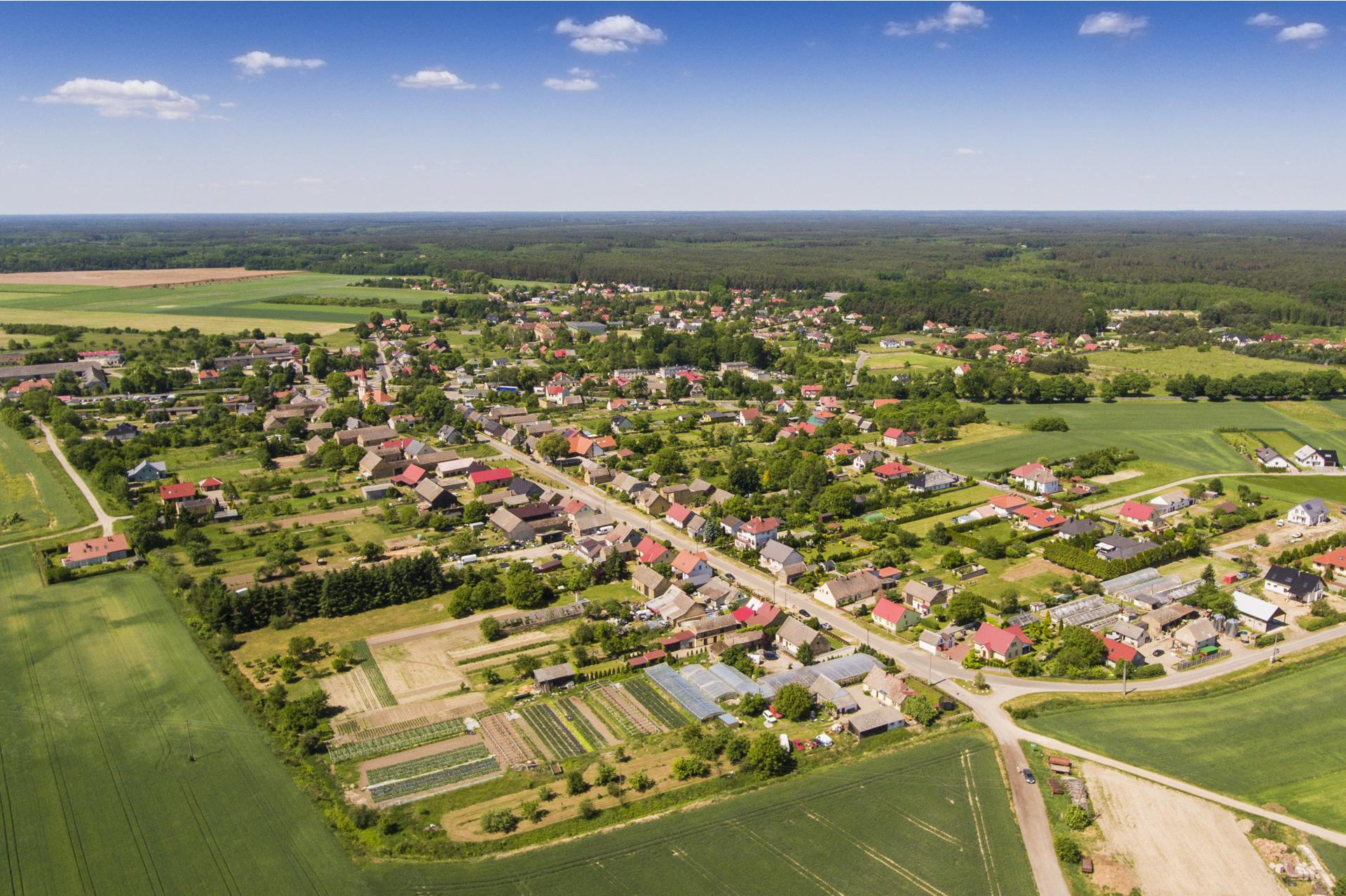 Różanki z lotu ptaka